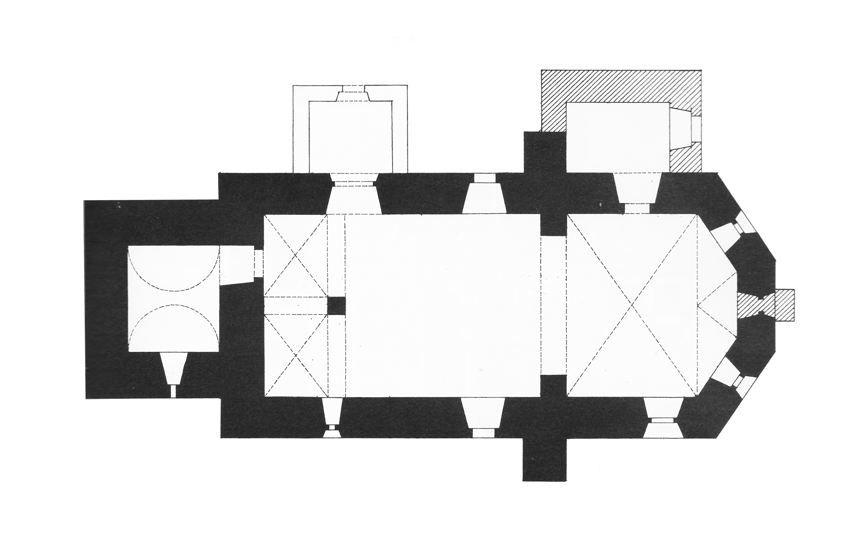 Půdorys kostel sv. Václava ze soupisu památek historických a uměleckých v politickém okresu ledečském